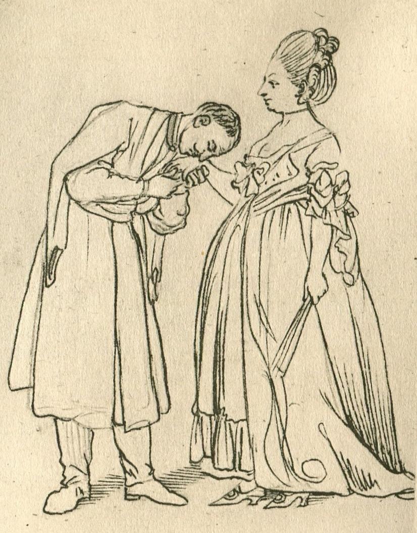 Handkuss von Daniel Chodowiecki (Die Gräfin Podoska und Chevalier Du Bouloir)